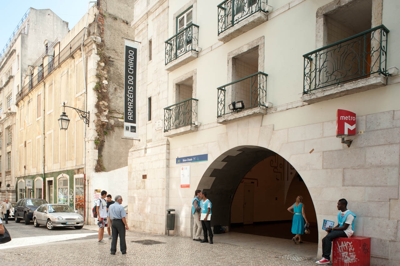 Estación Metropolitana de Baixa-Chiado Alvaro Siza Vieira 1992-1998 Lisboa Portugal 2011-08-25